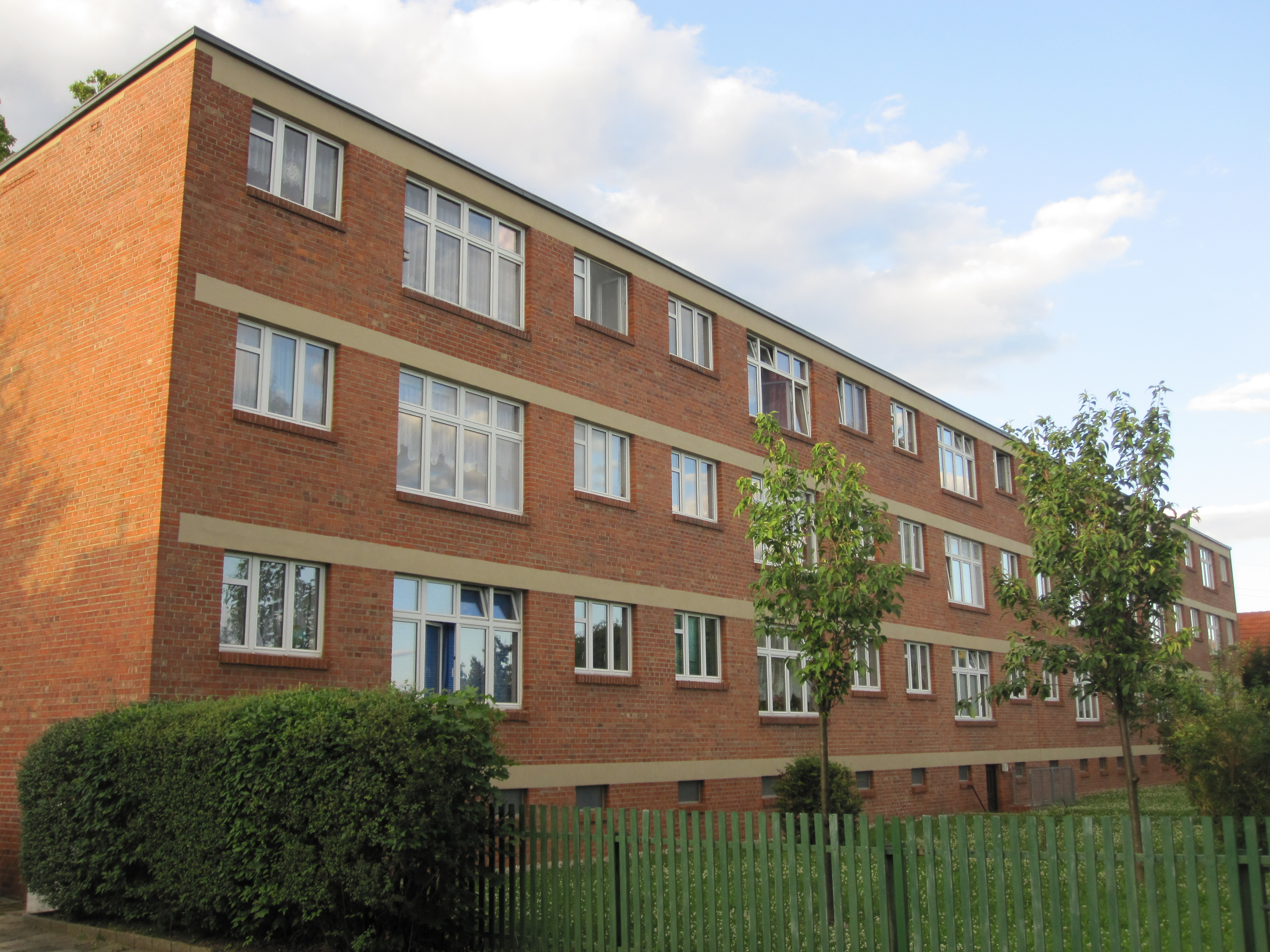 Laubenganghaus, Rückseite